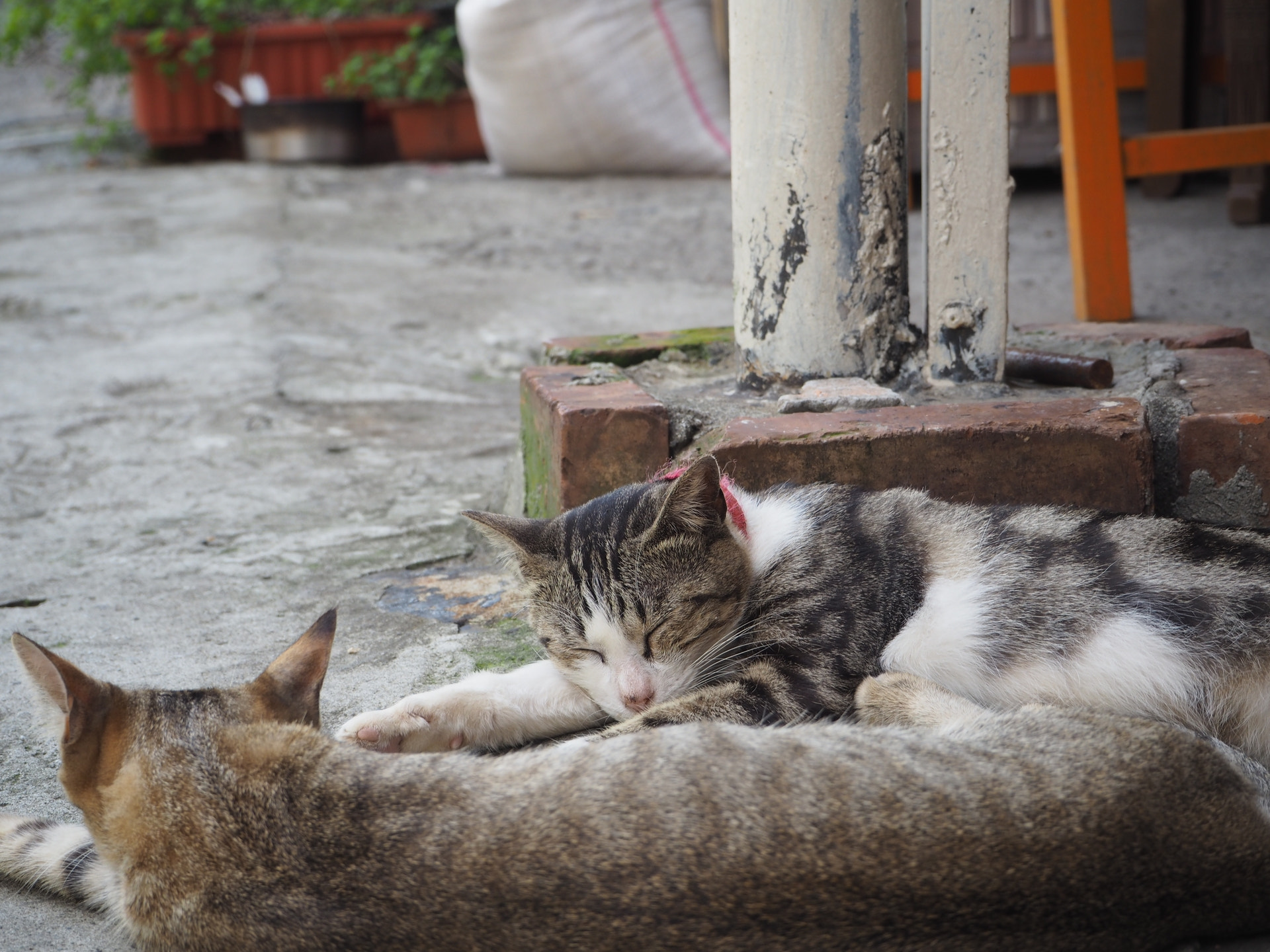 500px provided description: 猴硐 [#cat]